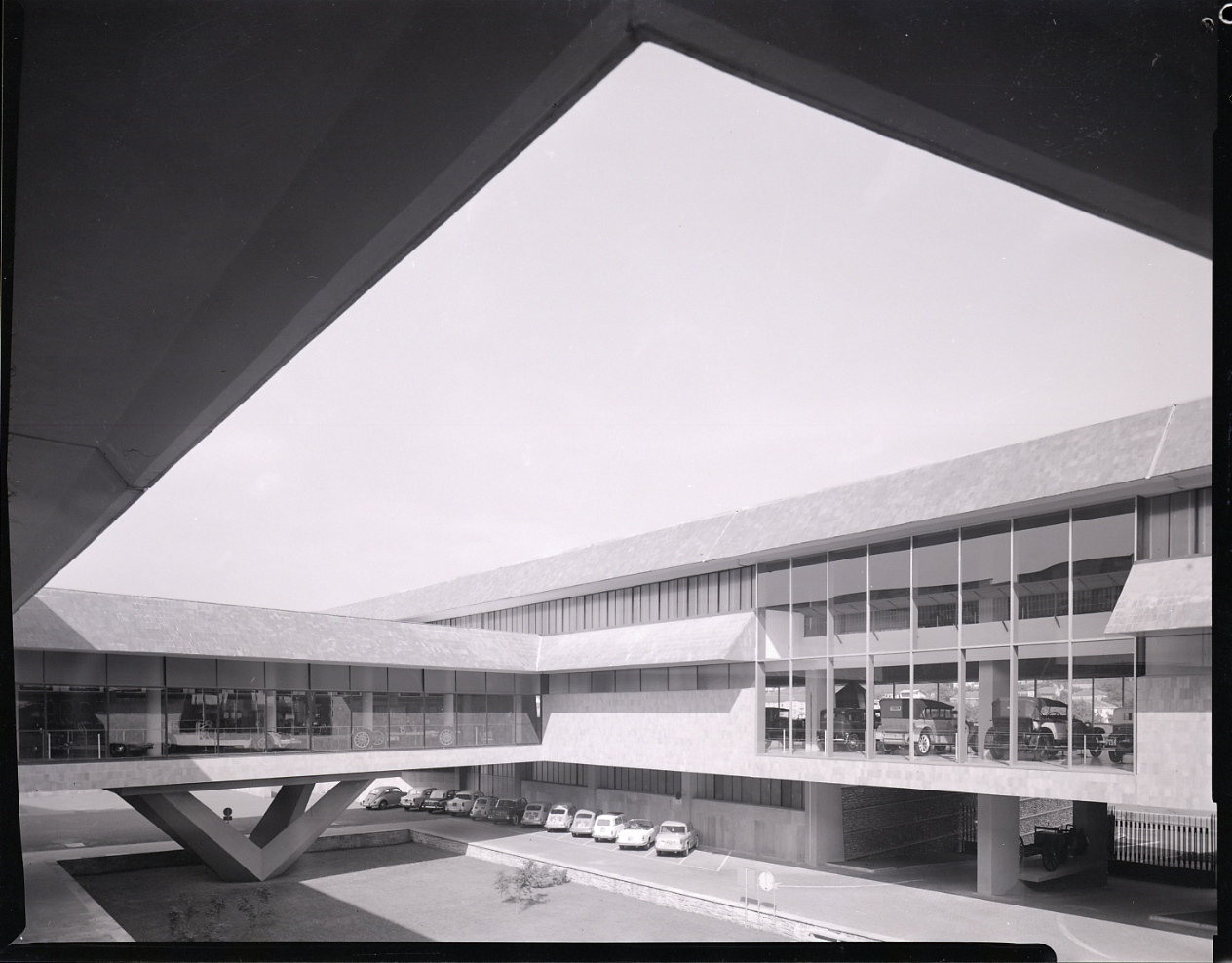 Servizio fotografico : Torino, 1963 / Paolo Monti. - Buste: 9, Fototipi: 9 : Negativo b/n, gelatina bromuro d'argento/ pellicola ; 10x12. - ((Serie costituita da 9 negativi identificati con i nn.: 2316423196, 23172-23173, 23179. Altra numerazione parallela: 39191-39196, 39199-39200, 39206. La suddetta serie è contenuta nella scatola identificata con la numerazione 22901-23200. - Fonte: Rubrica di Paolo Monti: Archivio 10x12 (ultimi numerati) - dal G1 al (s.d.), presso Archivio Paolo Monti